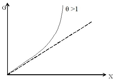 Закон Вагнера. Зависимость государственных расходов от роста ВВП.